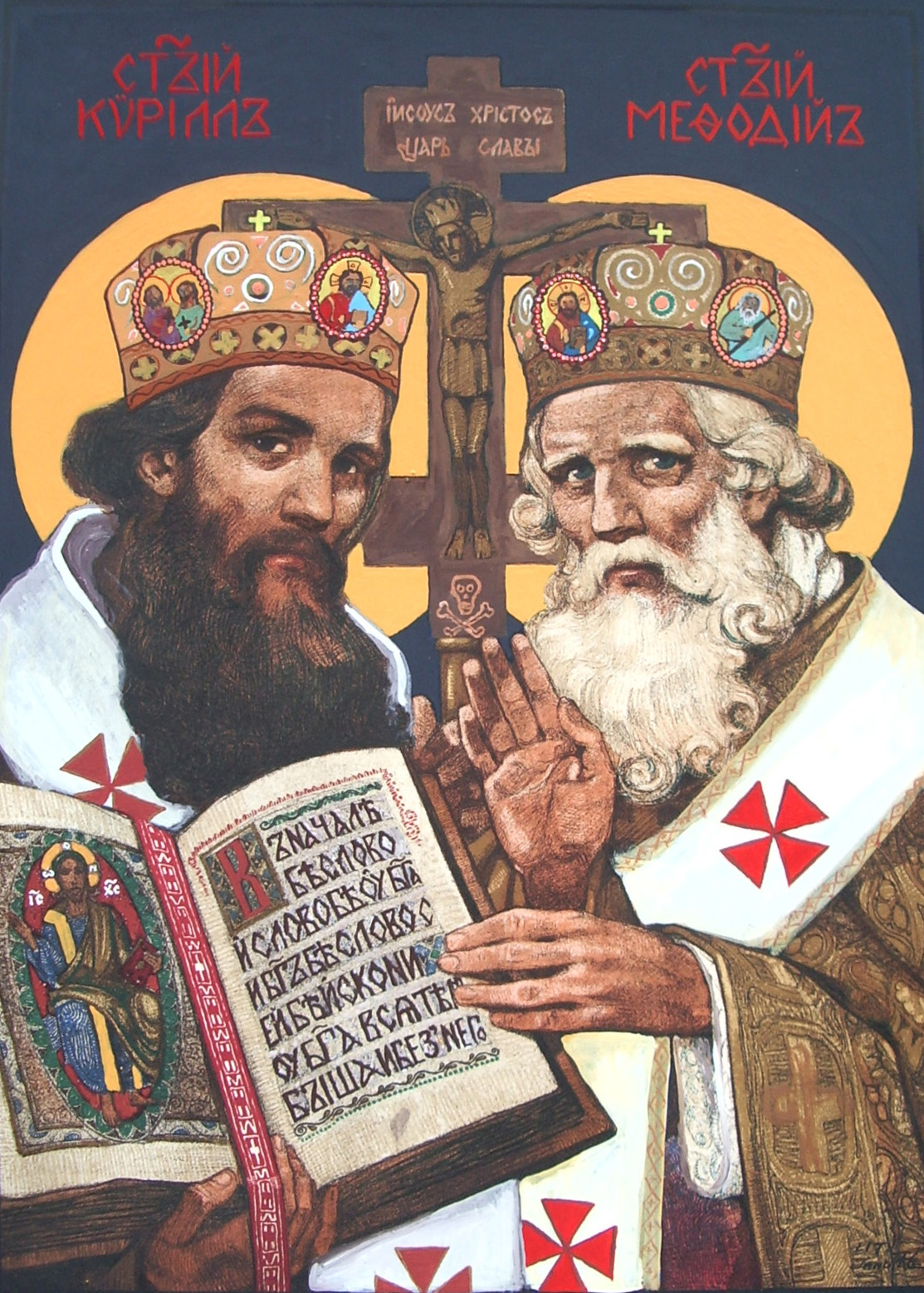 Cyril a Metod apoštoli Slovanov. Photo taken by Jozafát Vladimír Timkovič, OSBM